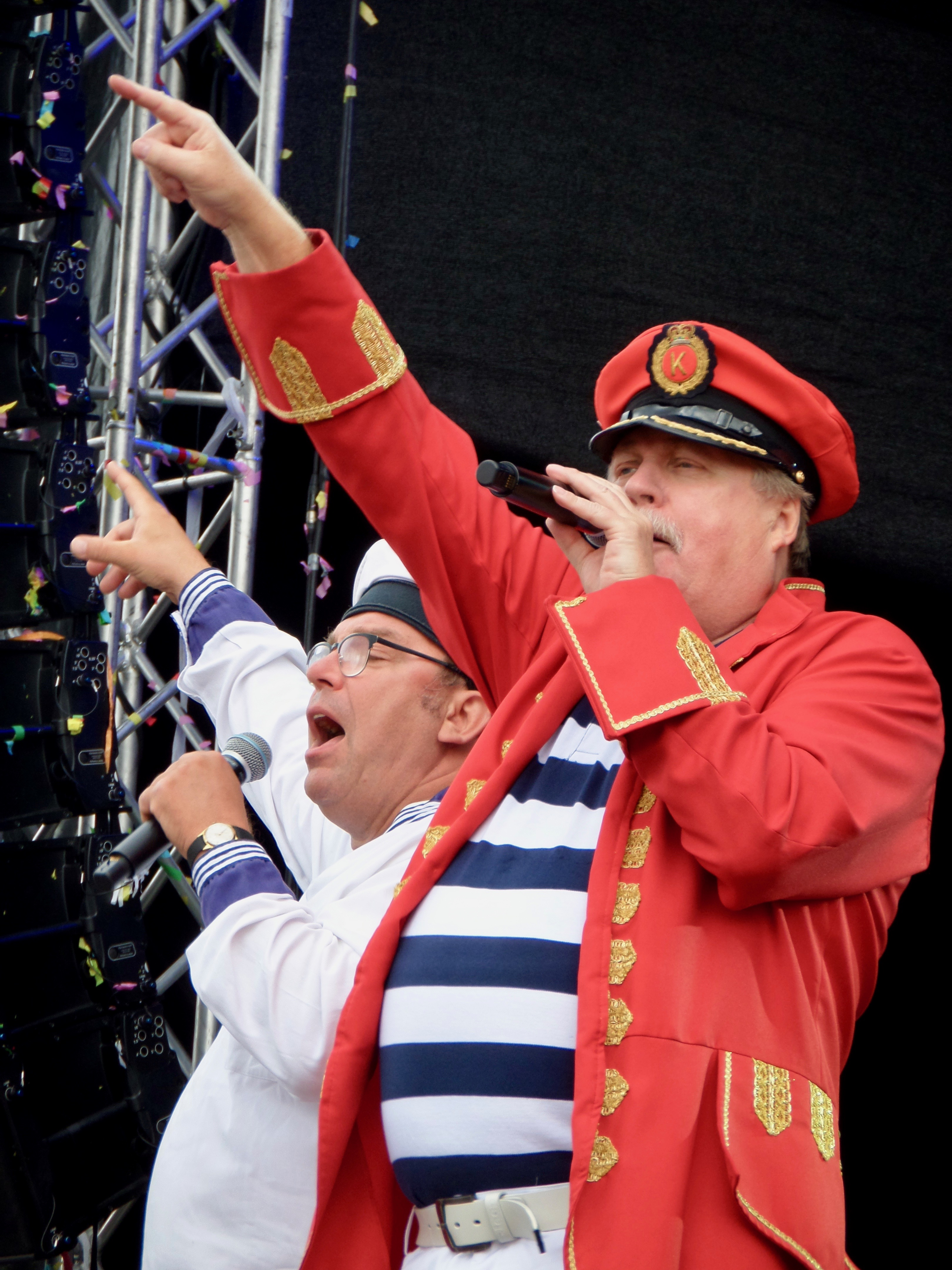 Klaus und Klaus Bremen Ole 2017